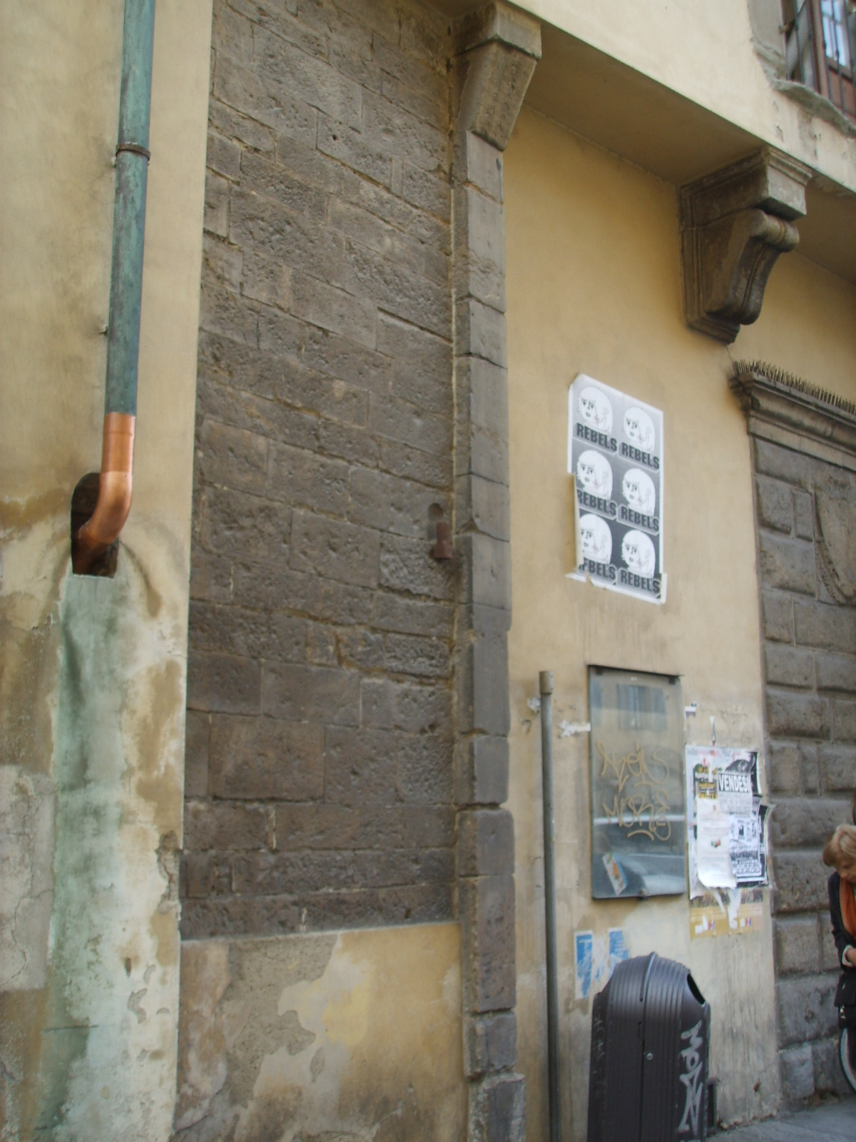 Via dell'anguillara, palazzo cocchi, antico cardine della porta della vecchia cerchia